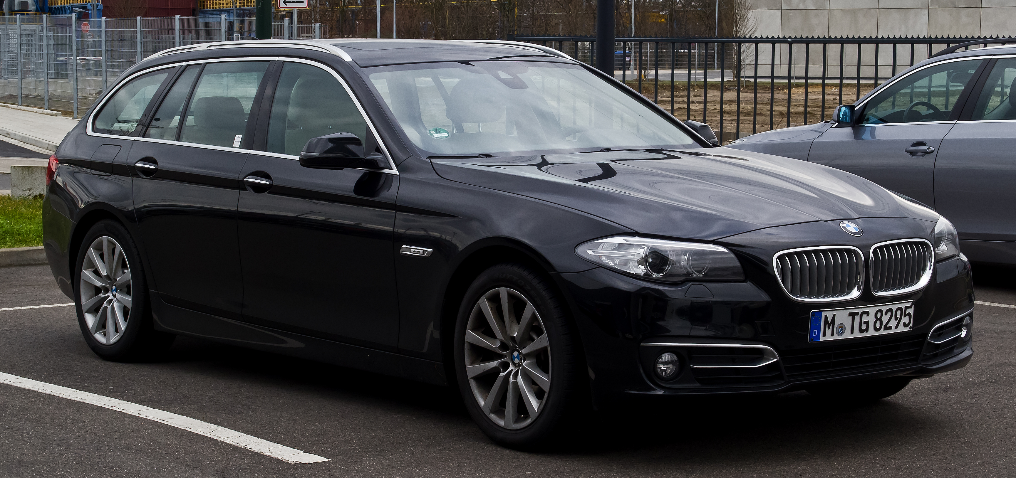 BMW 520i Touring Modern Line (F11, Facelift)